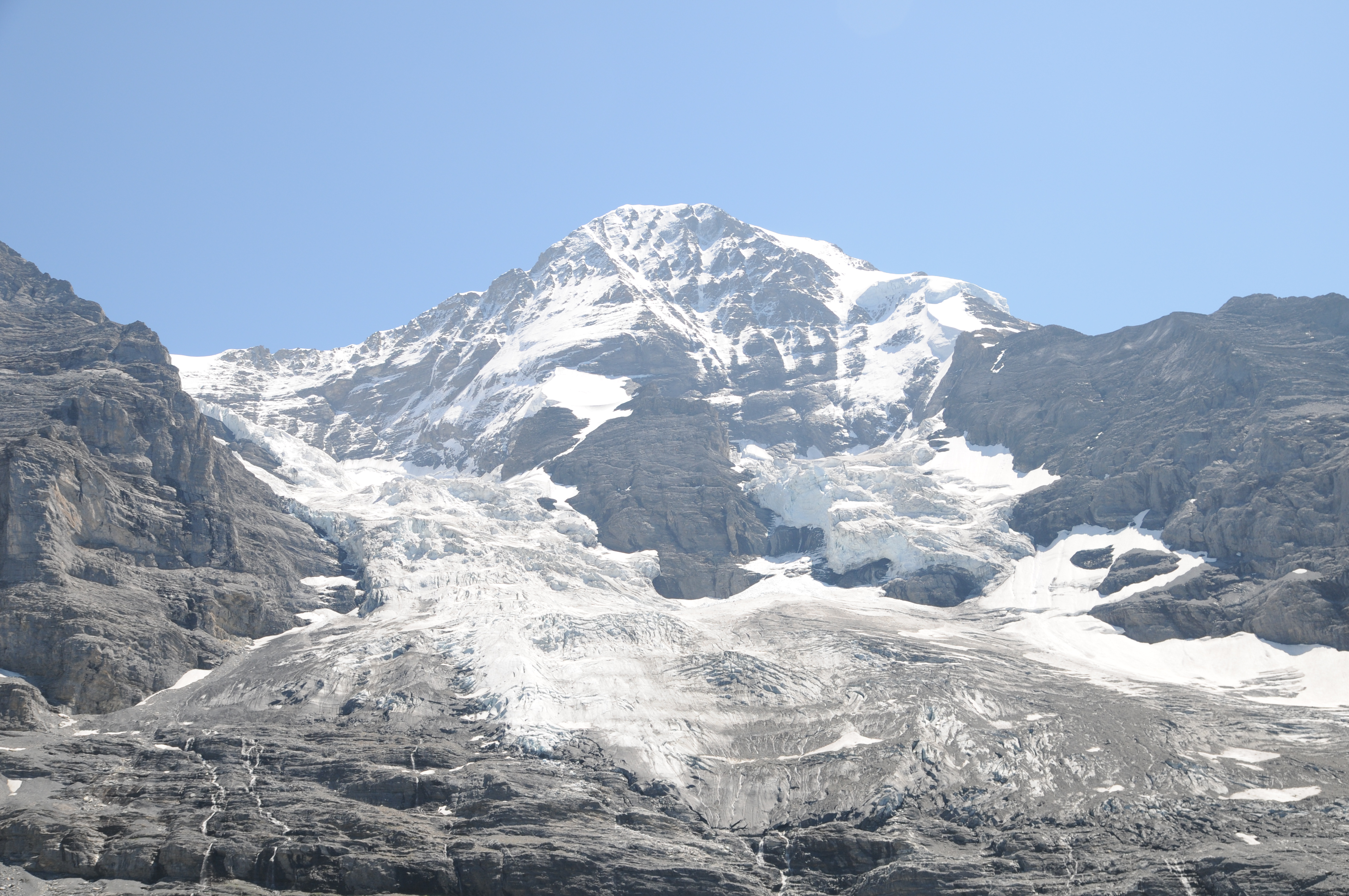 Berner Oberland.